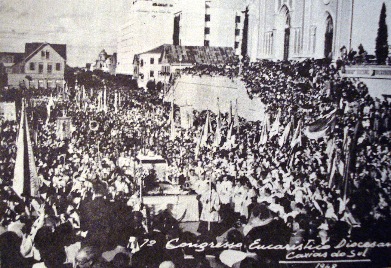 Procissão do 1º Congresso Eucarístico Diocesano em Caxias do Sul